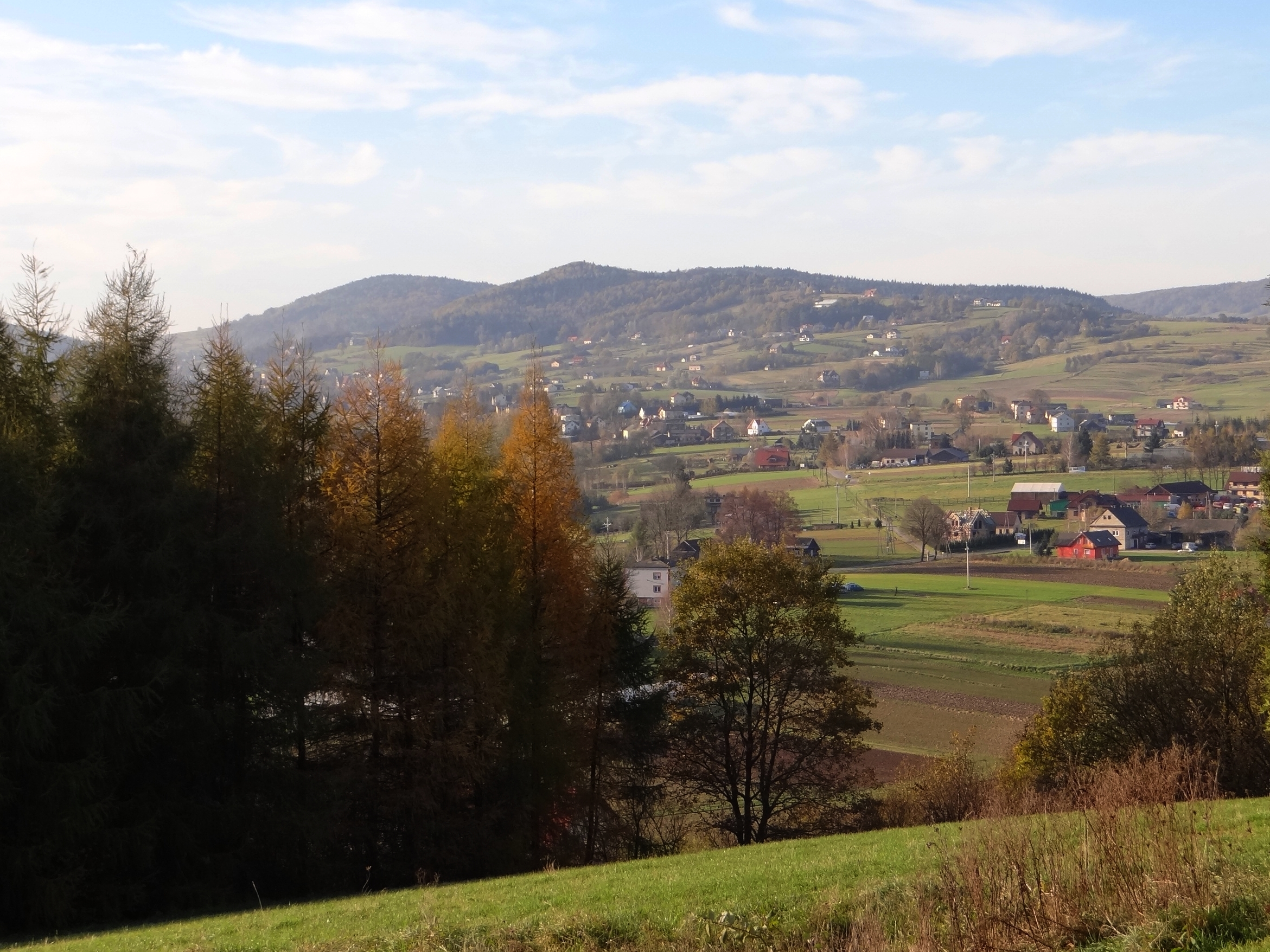 Widok spod krzyża milenijnego w Połomiu Małym na Sołtysie Góry, Porąbkę Iwkowską i Wojakową